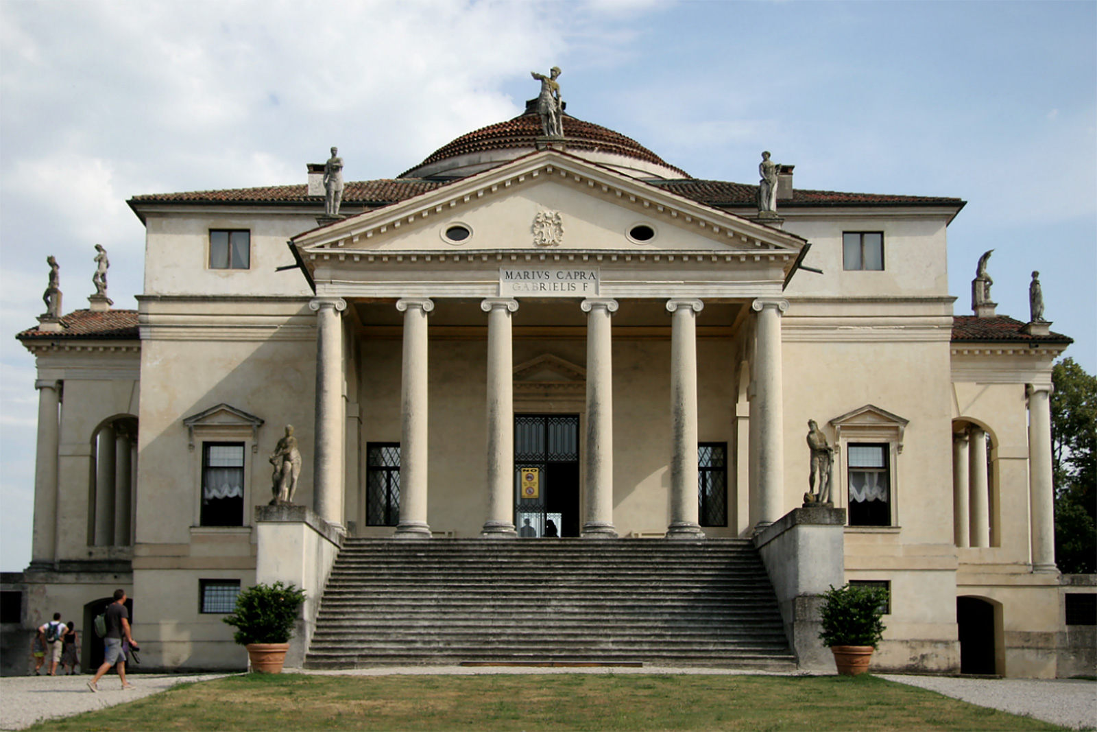 Villa Almerico Capra (La Rotonda), Vicenza, Italia.